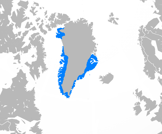 Idioma groenlandés